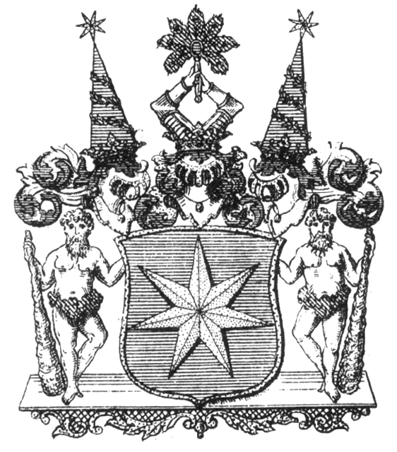 Gyllenstierna av Björksund och Heljö